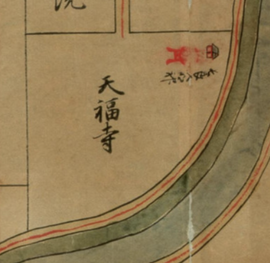 館林代官町長良神社 綱吉時代の長良神社 〔日本古城絵図〕 東山道之部（4）. 165 館林御城図より抜粋 別当寺である天福寺も見える